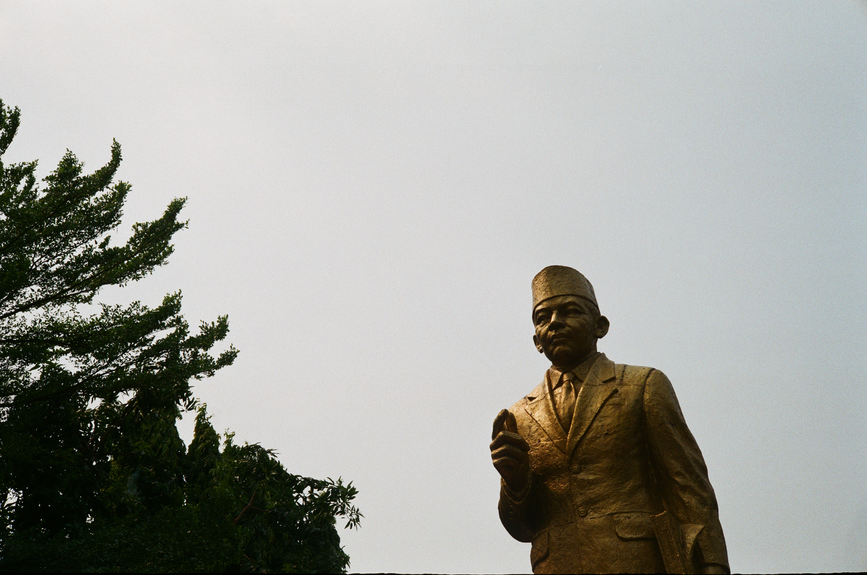 Monumen patung M.H. Thamrin di halaman gedung